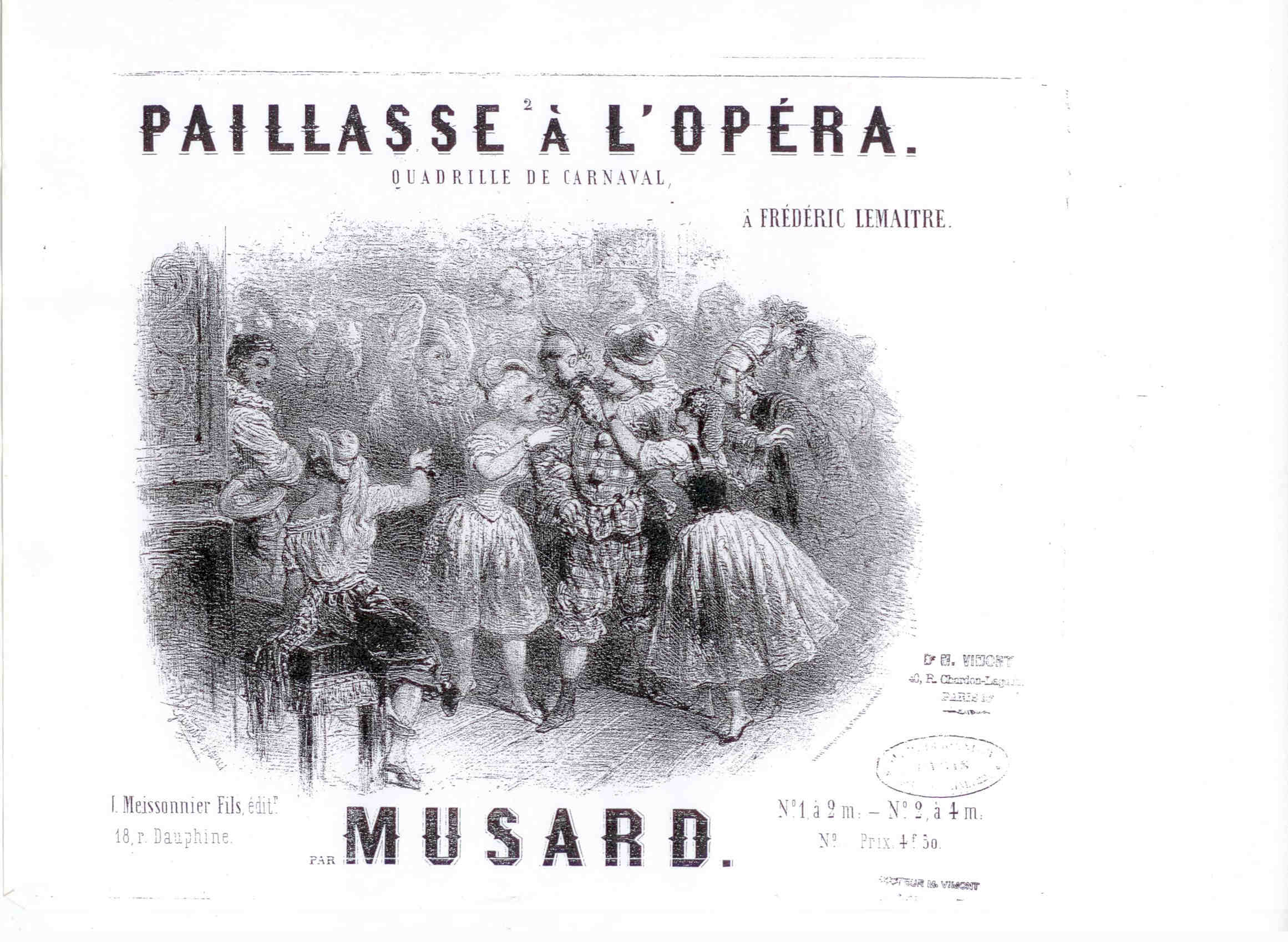 Partition de Philippe Musard